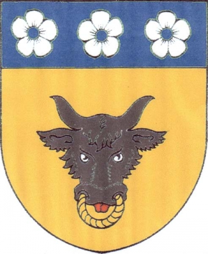 znak, Žďánice, okres Žďár nad Sázavou